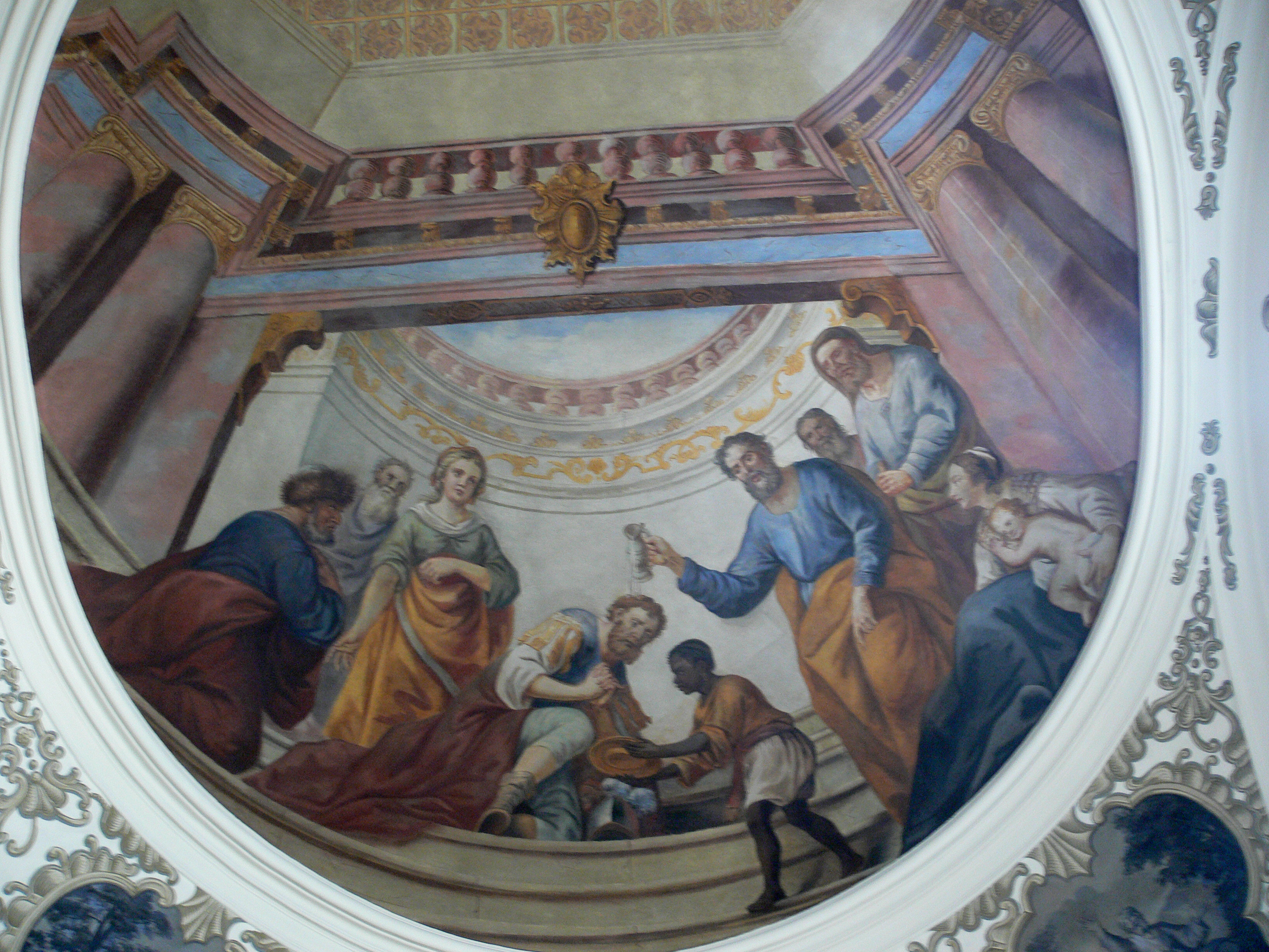 Stadtpfarrkirche St. Martin, Biberach an der Riss Johannes Zick: Vorhalle, Deckenfresko: "Die Taufe des Hauptmanns Cornelius", 1746